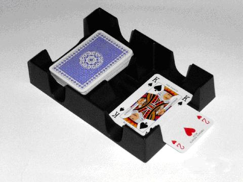 Bildbeschreibung: Canasta Fotograf/Zeichner: Roland Scheicher Datum: 5.6.2006